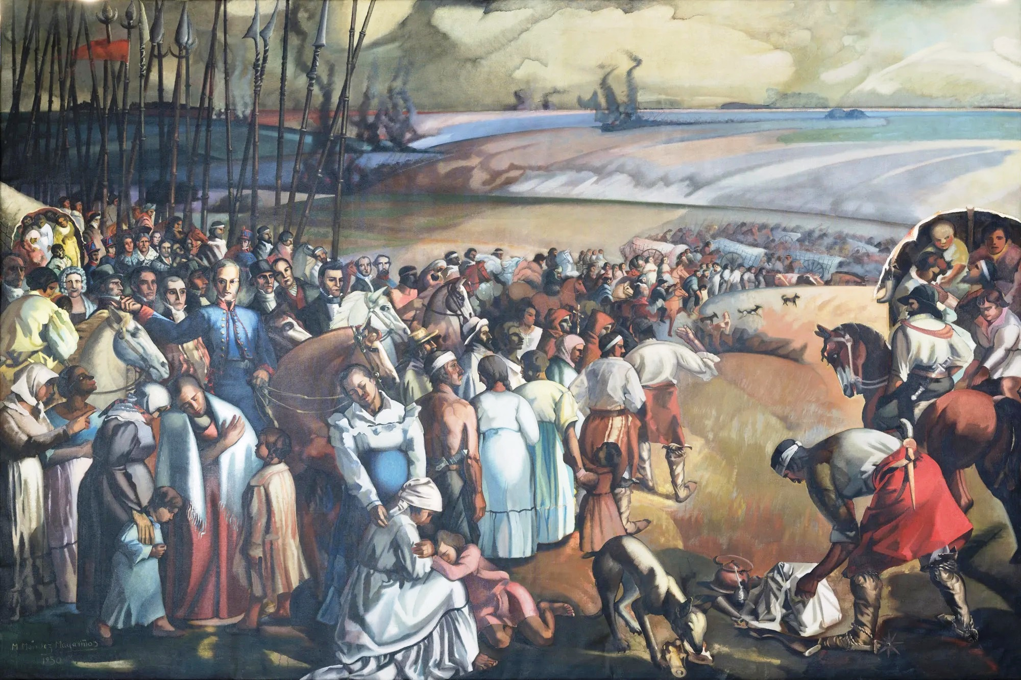 Fotografía en blanco y negro de la obra del pintor uruguayo Melchor Méndez Magariños (1885 - 1945) "El Éxodo del Pueblo Oriental".